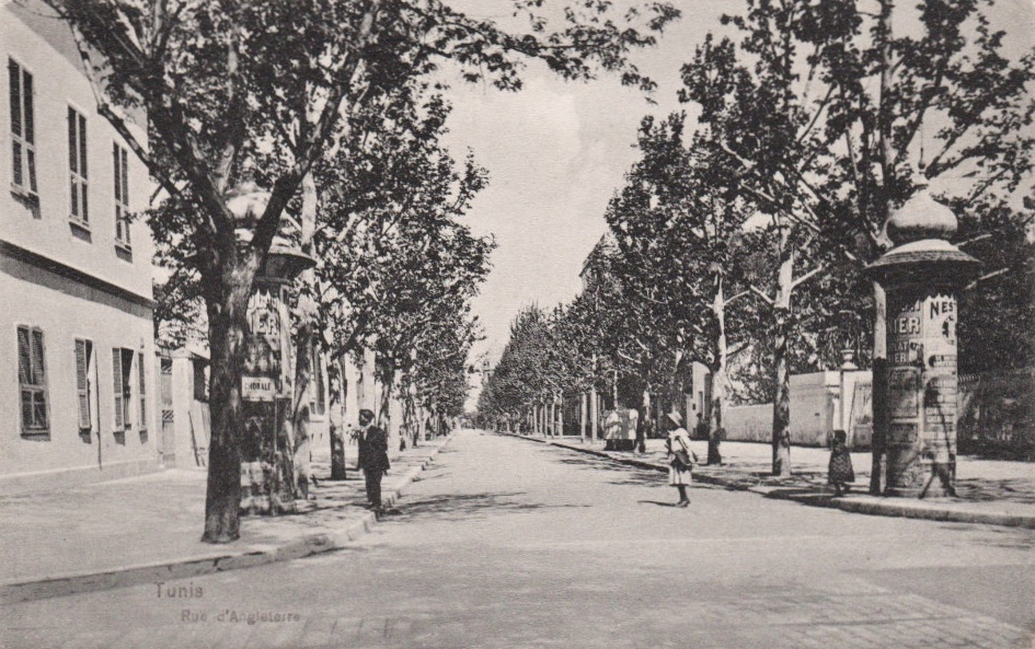 Tunis, rue d'Angleterre, vers 1910/1920.